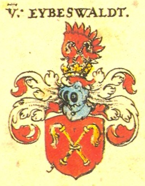 Eibeswaldt (Eibiswald, Eybiswald), nach Siebmacher